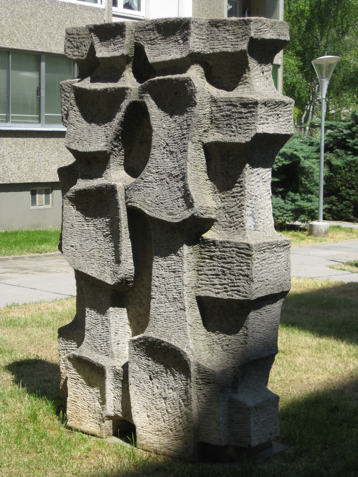 Skulptur Rat der Alten in der Wohnhausanlage Pantucekgasse 9-11 in Wien-Simmering, 1973 von Franz Xaver Hauser aus Lindabunner Konglomerat gehauen.